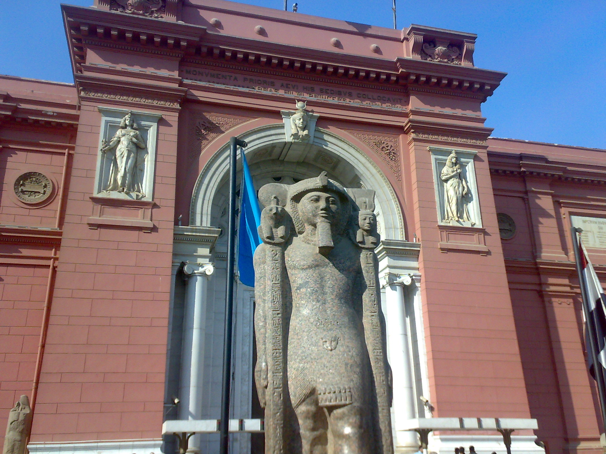 مدخل المتحف المصري